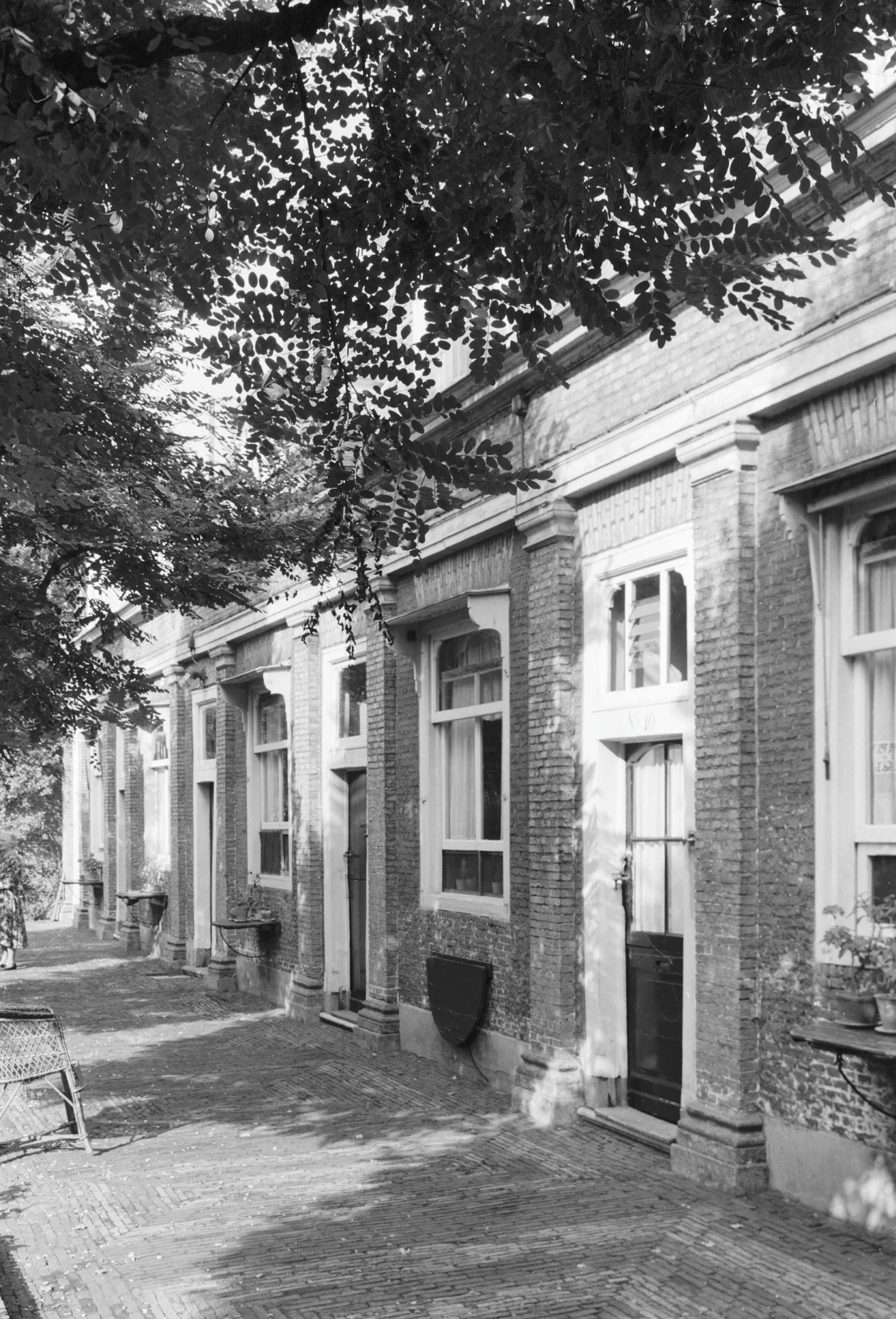 Hofje van Hoogeveen: gevels